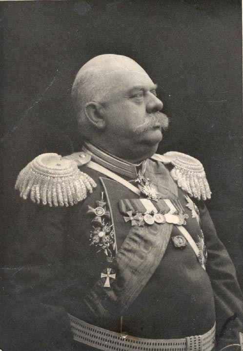 Georg Edvard Ramsay 1834-1918